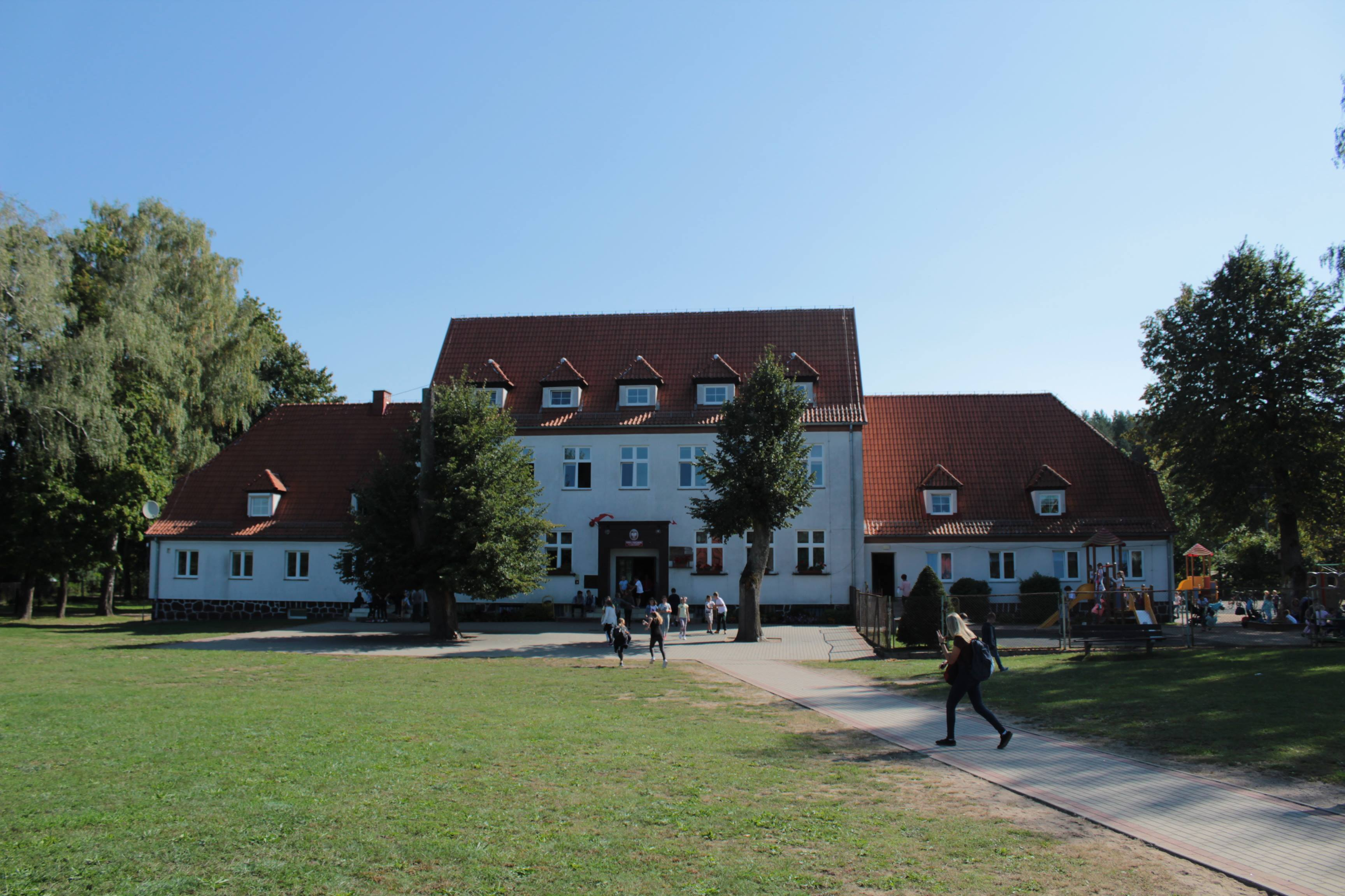 The Primary School K.I.Gałczyński with a gymnasium in Kruklanki